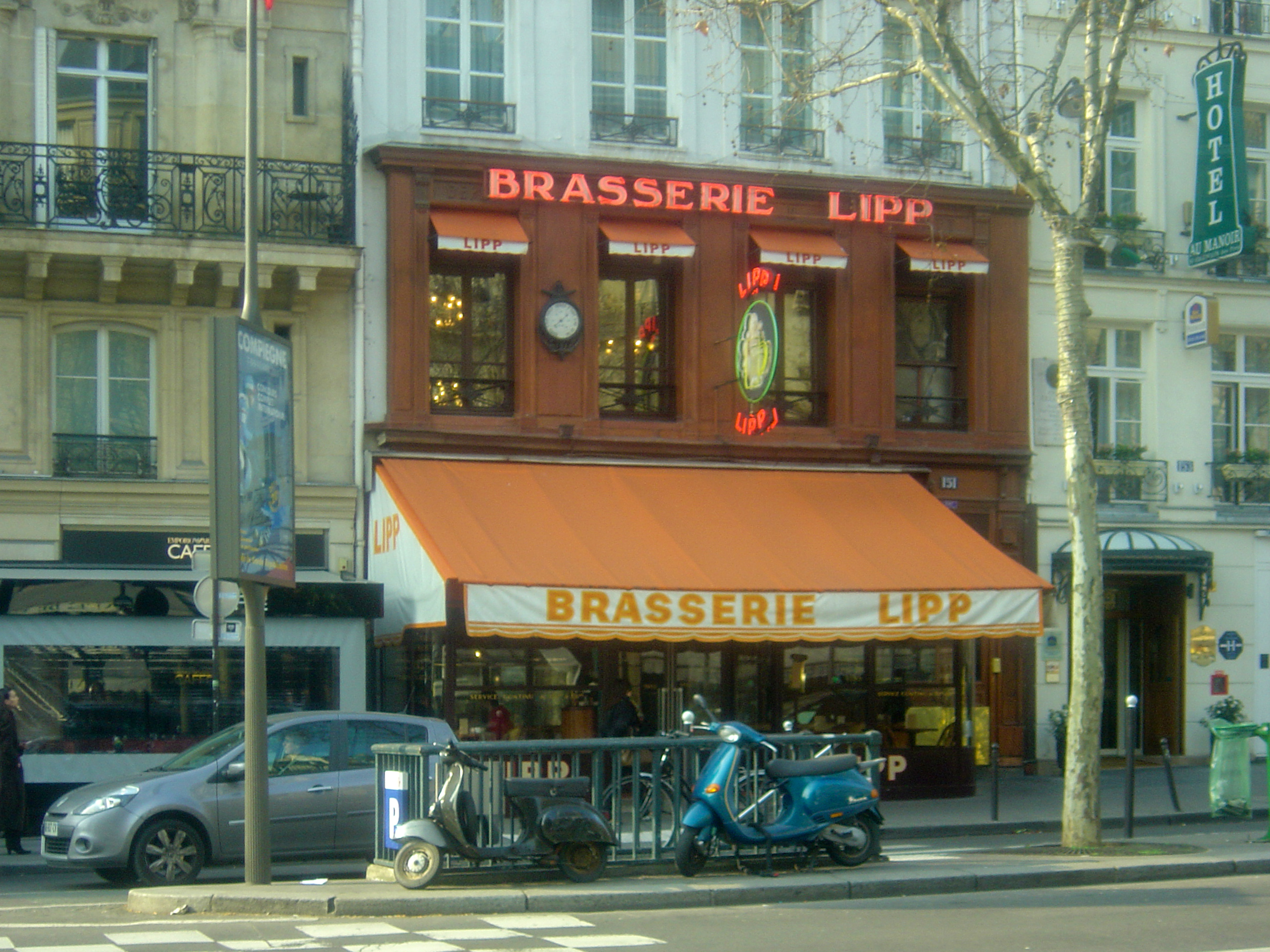 Η Μπρασερί Λιπ, Παρίσι - Μπουλβάρ Σαιν-Ζερμαίν, 2011